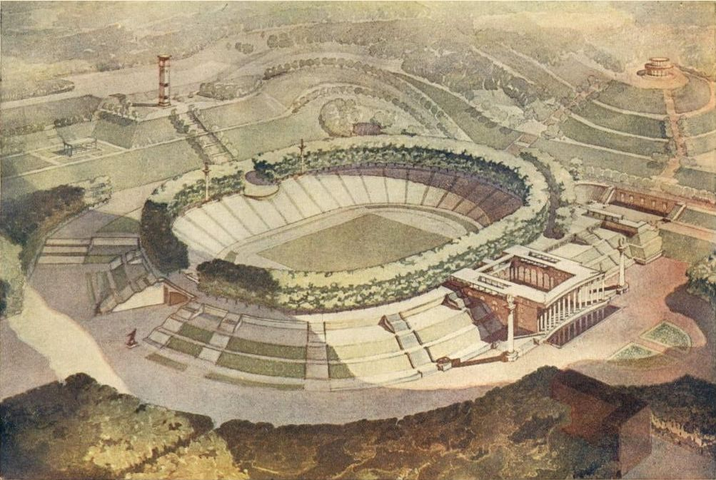 Стадион им. Косиора, арх. М. Гречина и др.